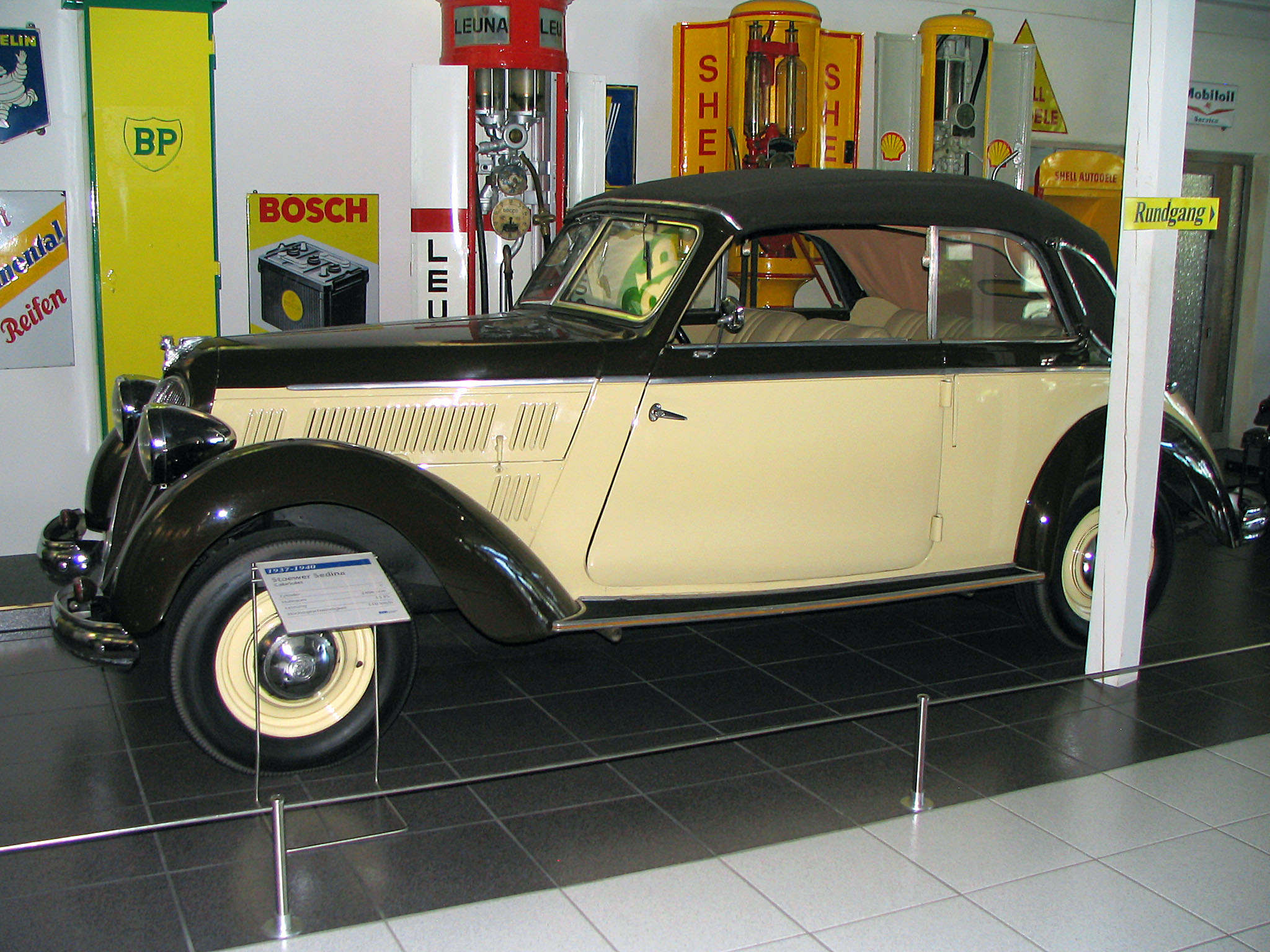 Stoewer Sedina Cabriolet 1937-1940 Hubraum 2406 ccm Leistung 55 PS Höchstgescheindigkeit 100 km/h EFA-Museum für Deutsche Automobilgeschichte